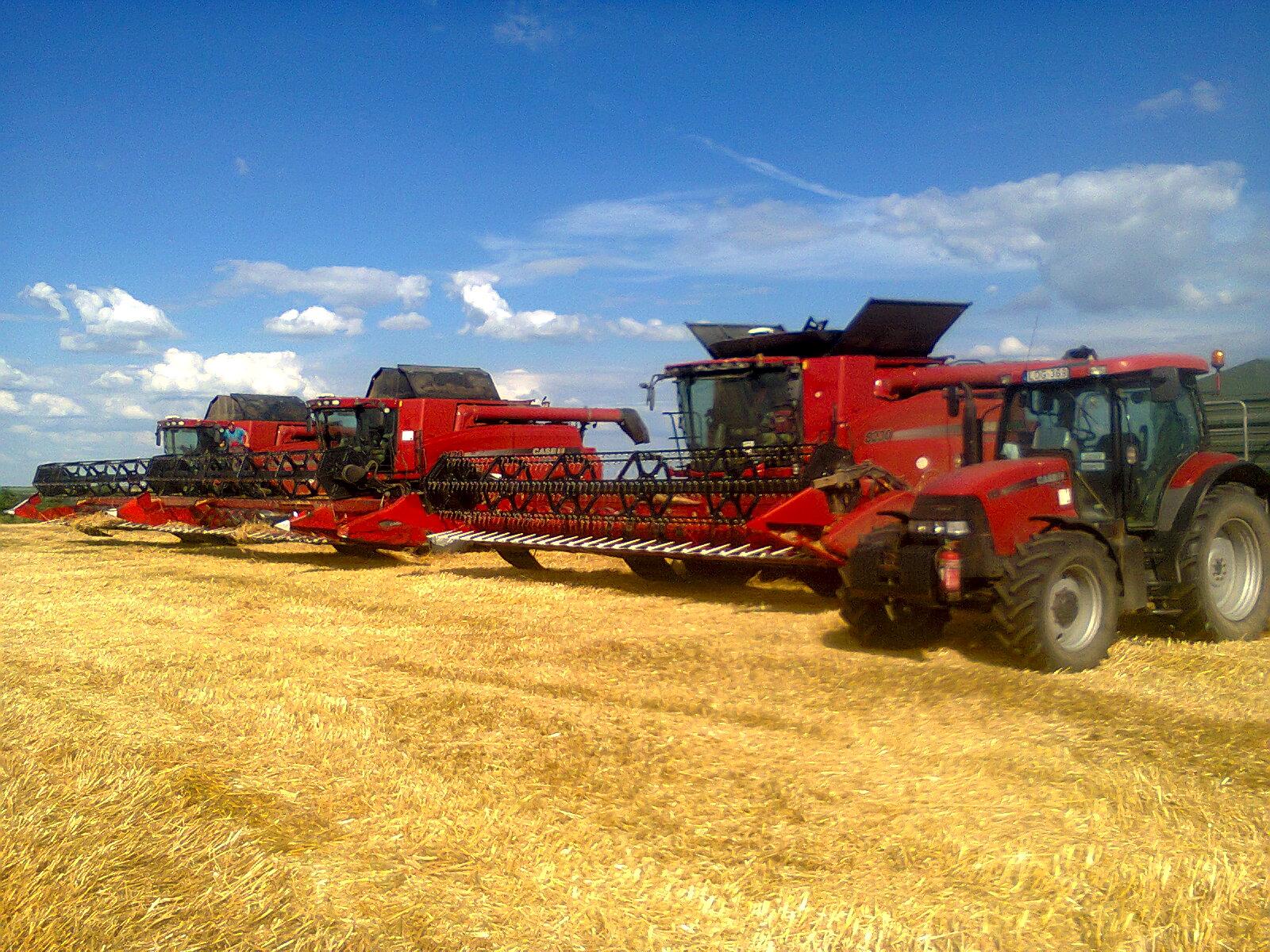 Aratás, Baracska és Ráckeresztúr határán. Ebédszünet!